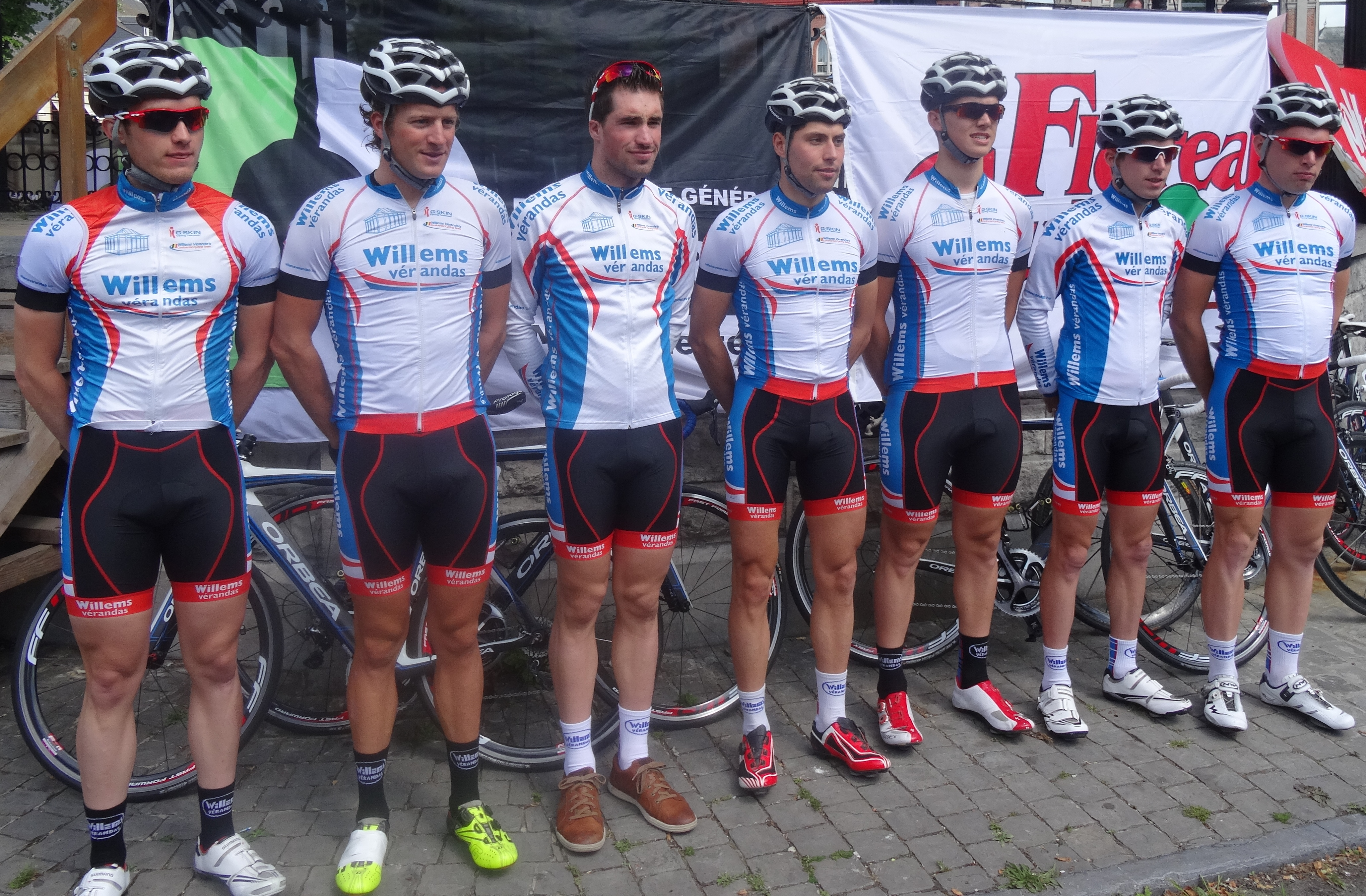 Reportage réalisé le samedi 17 mai à l'occasion du départ du Grand Prix Criquielion 2014 à Boussu, Belgique.